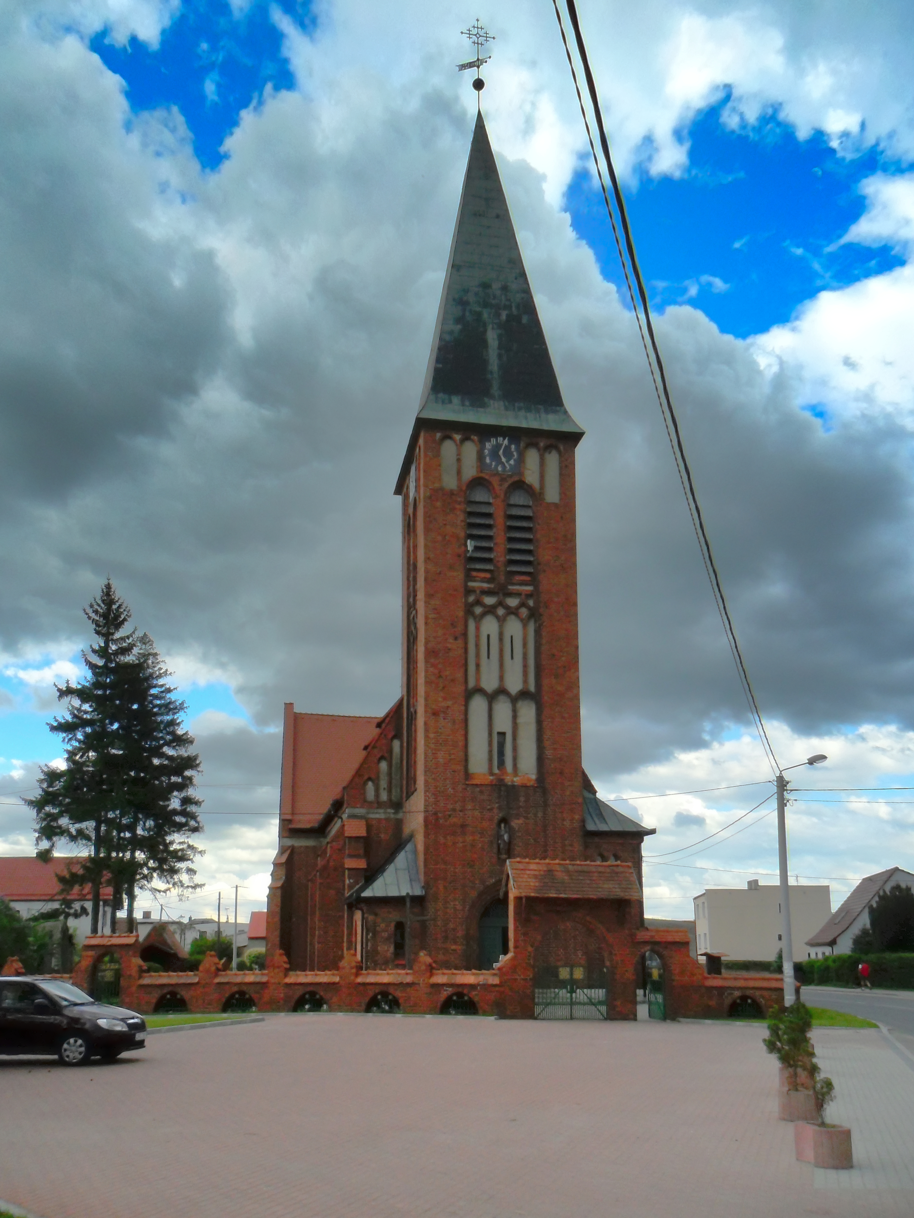 Kościół w Pawłowie, woj. śląskie, powiat raciborski